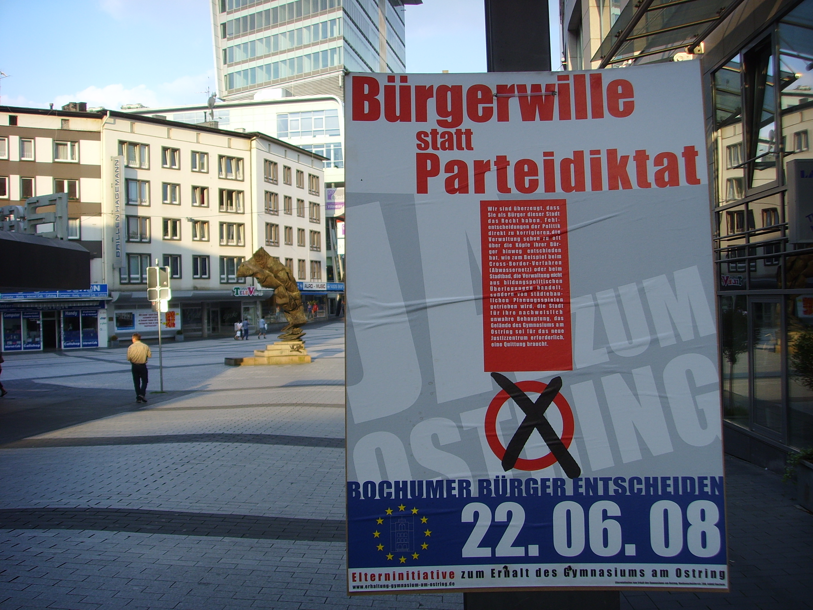 Plakat zum Bürgerbegehren zum Erhalt des Gymnasiums am Ostring. Die Abstimmung ist am 22 Juni 2008. Source: own work Date: June 2008, Bochum, Germany Author: Maschinenjunge Licence: GFDL, cc-by 3.0 de: Gymnasium am Ostring